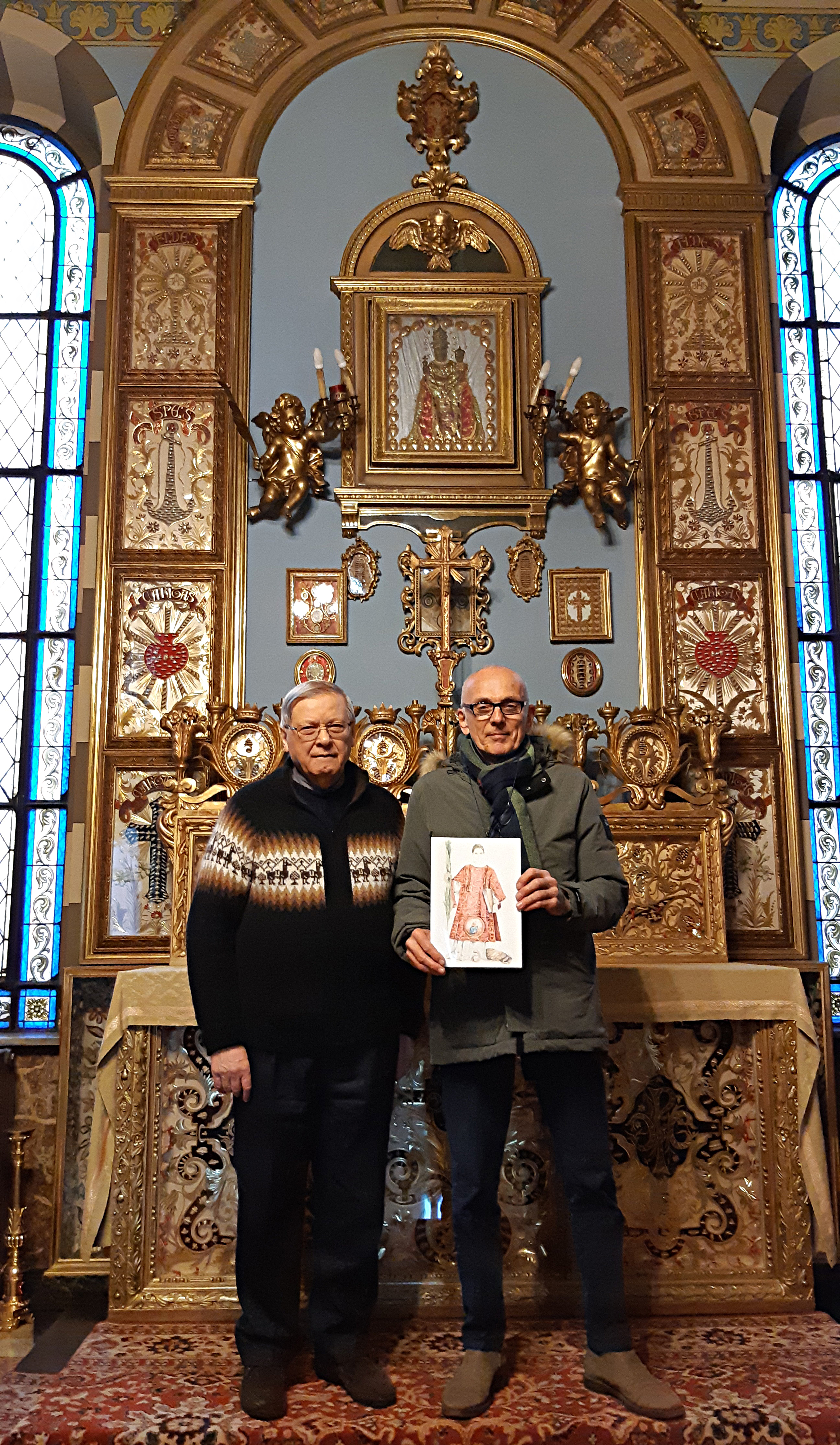 Torino, Santuario delle Reliquie, Chiesa grande della Piccola Casa della Divina Provvidenza - Cottolengo: don Lino Piano e Bruno Doimo espongono la reliquia di San Cesario diacono e martire e la sua icona.